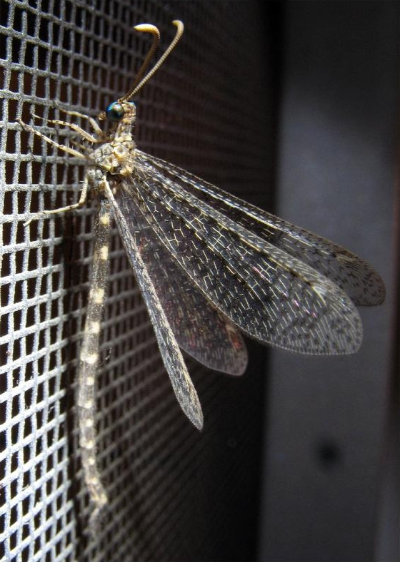 Brachynemurus sackeni, male.